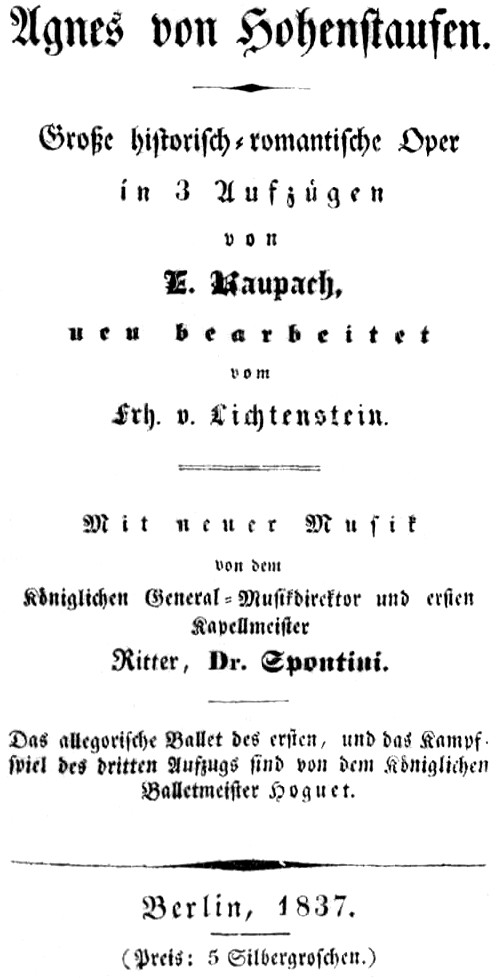 Spontini - Agnes von Hohenstaufen - Berlin 1837